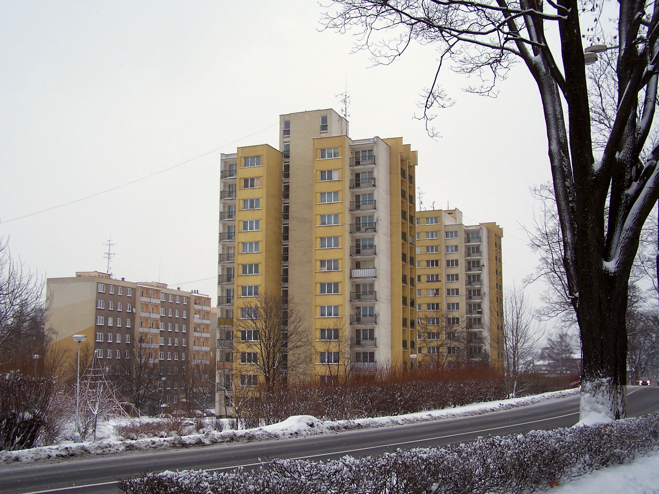 Paneláky (prefabricated concrete houses) in Český Těšín (Czeski Cieszyn), Czech Republic.